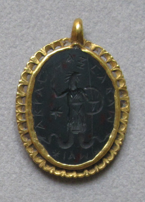 Arte romana, amuleto con dio aguipede e testa di gallo, diaspro sanguigno e oro, III sec